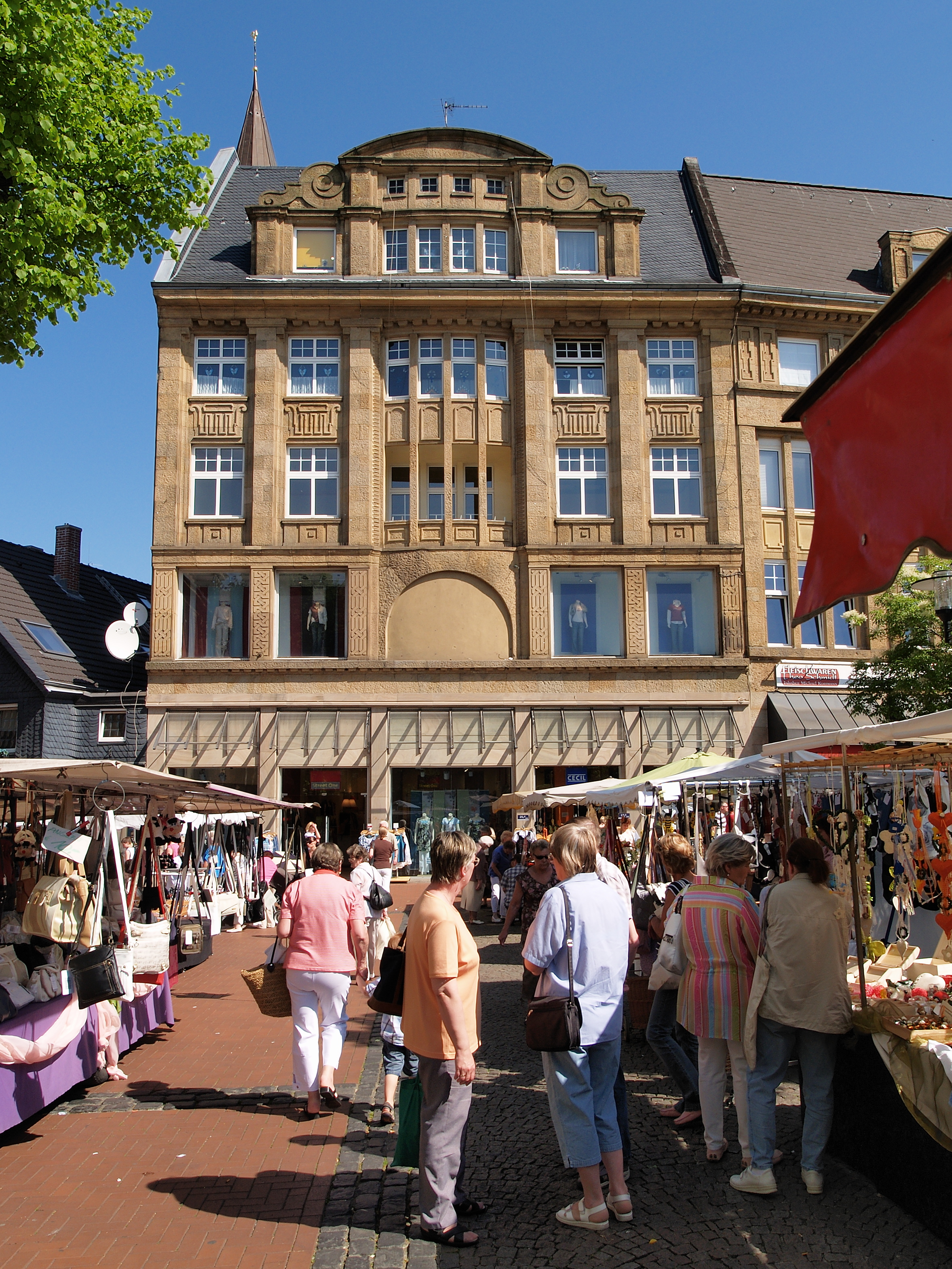 Gebäude an der Nordseite des Marktplatzes in Castrop-Rauxel, Am Markt